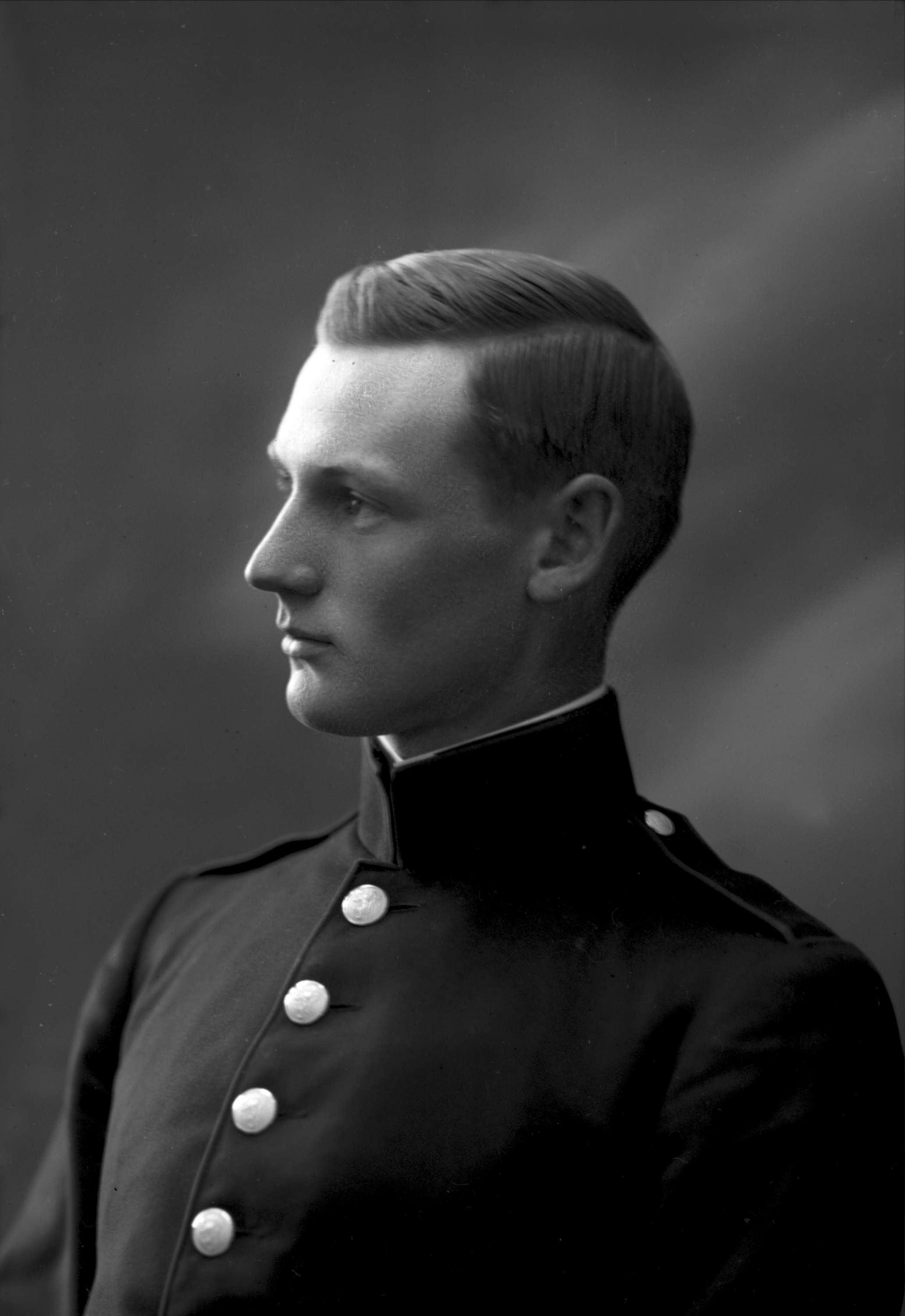 Alv Kjøs